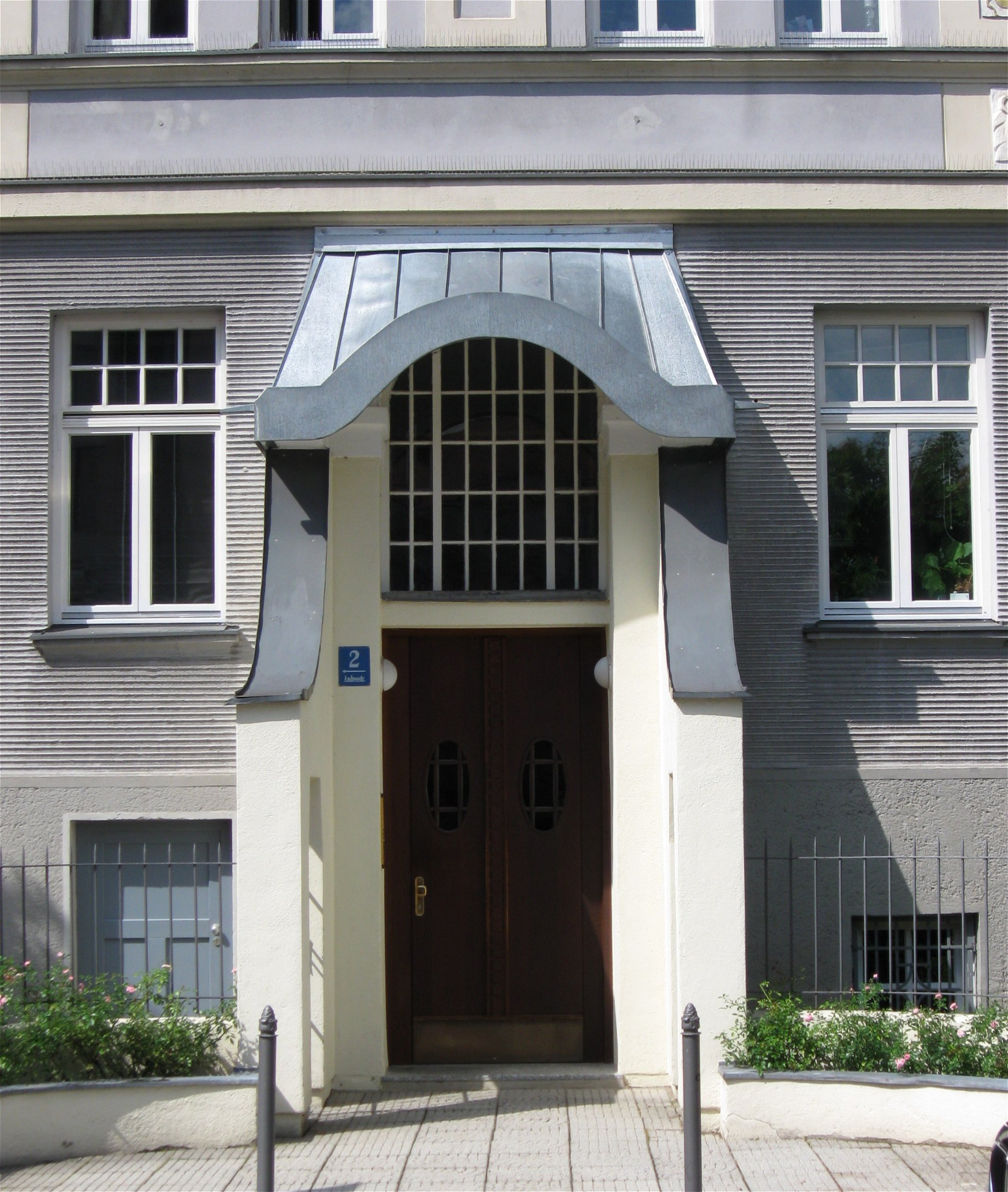 Andréestraße 2; Mietshaus, barockisierender Eckbau, 1912 von Wilhelm Borchert.